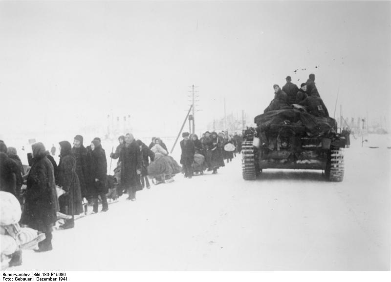 An der Sowjetfront: [bei Istra] Vor den deutschen Truppen geflüchtete Bauern kehren in ihre Dörfer zurück. PK-Aufnahme: Kriegsberichter: Gebauer 332-42 "Fr." "Fr.OKW" Dez. 41